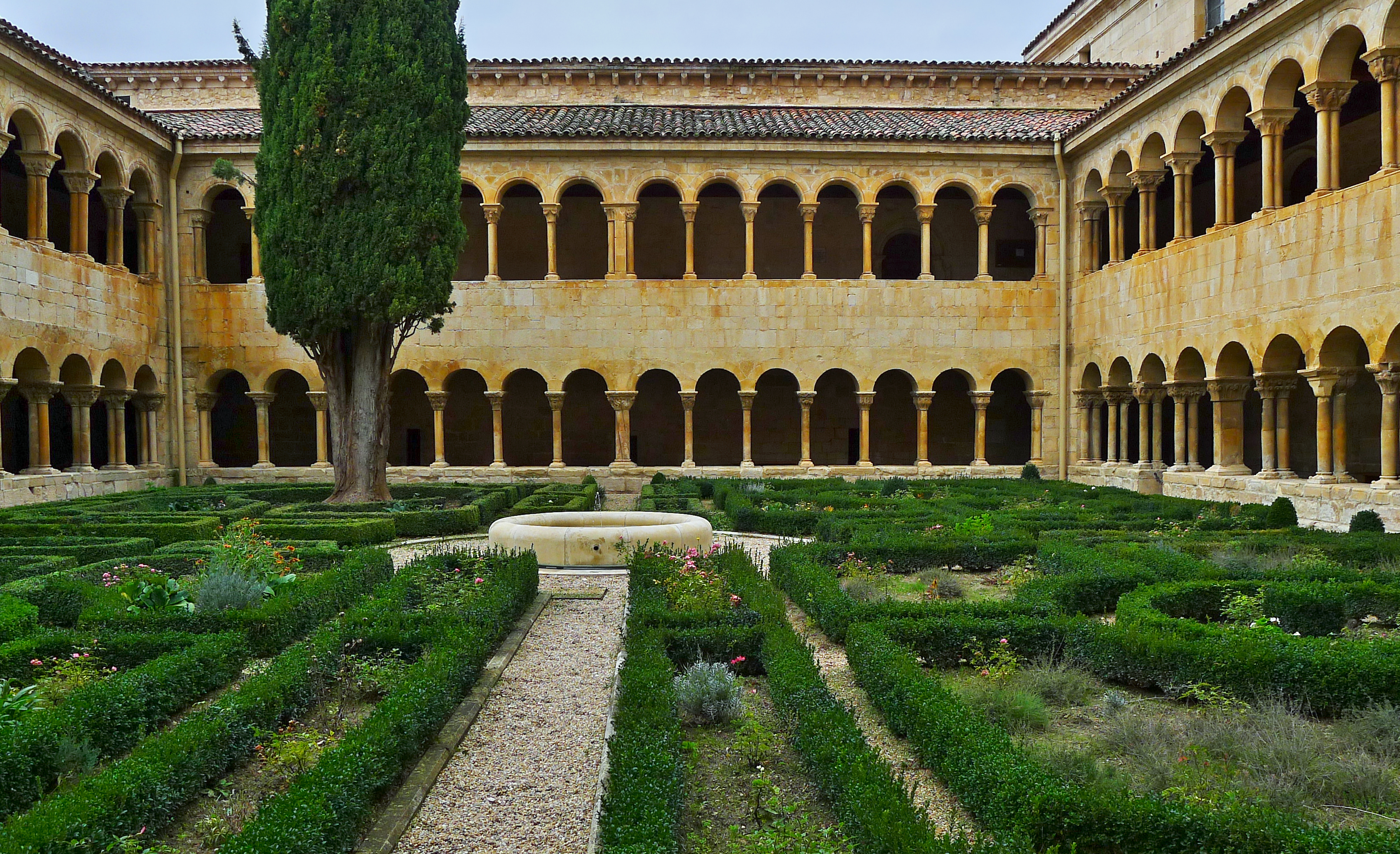 Fernando I de León, conde de Castilla, alcanza su propósito: investir de abad de Silos a Domingo Manso de Zúñiga (†1073). El cañense, prior benedictino del Monasterio de San Millán de Suso, el que se manifestó ante el rey García de Nájera con Puedes matar el cuerpo, las carnes mal traer, mas non as en la alma, rey ningun poder, el gran restaurador del Monasterio de Silos.